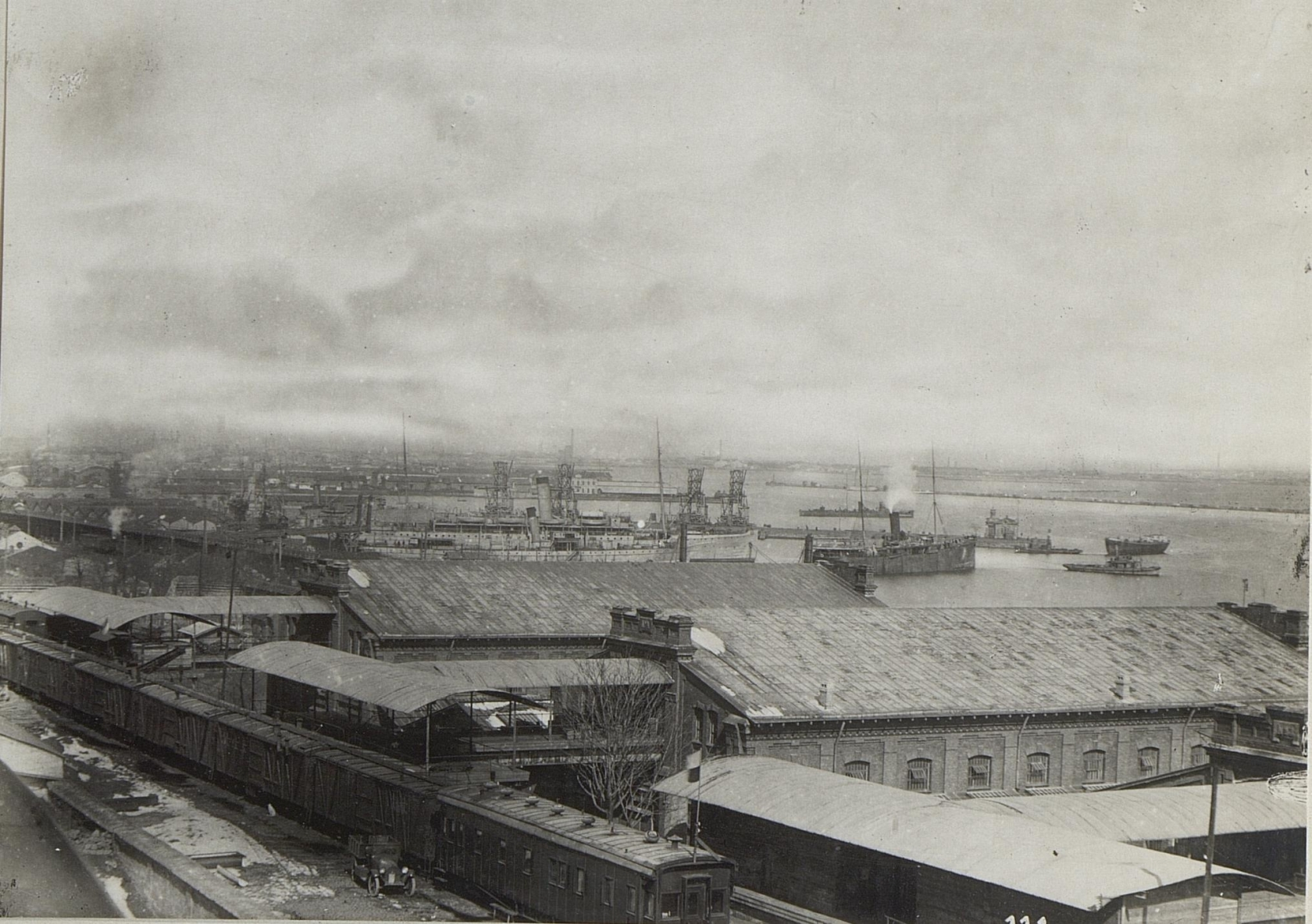 Hafen von Odessa